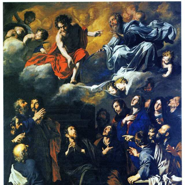 Opera magnifica custodita a Leonforte nella chiesa dei Frati Minori Cappuccini.Commissionata dal principe Nicolò Placido Branciforti ,conte di Raccuja,principe di Butera e cavaliere dell'ordine di San Giacomo